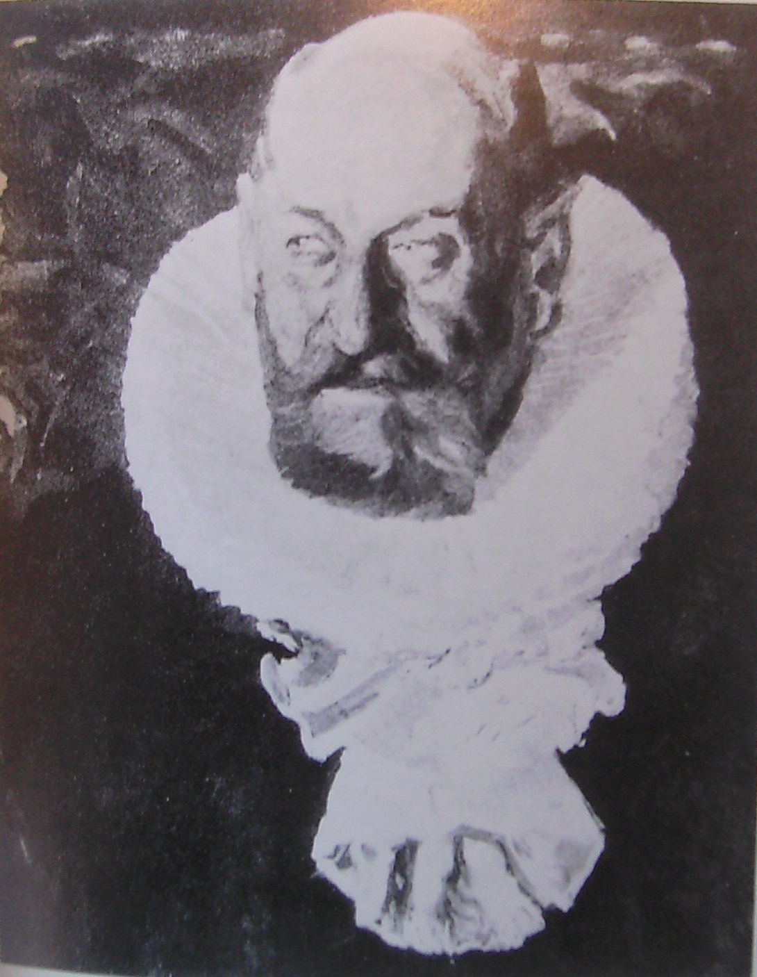 Portrait Hermann Schemmann (Maler: Albert Weisgerber, 1909)